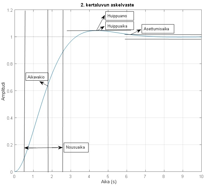 2.kertaluvun järjestelmän tunnuslukuja